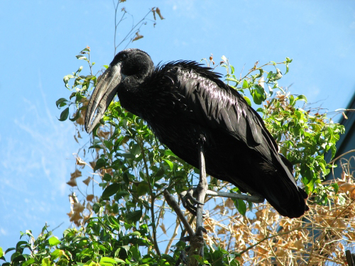 African Open Bill Stork (Anastomus lamelligerus) in Louisville Zoo